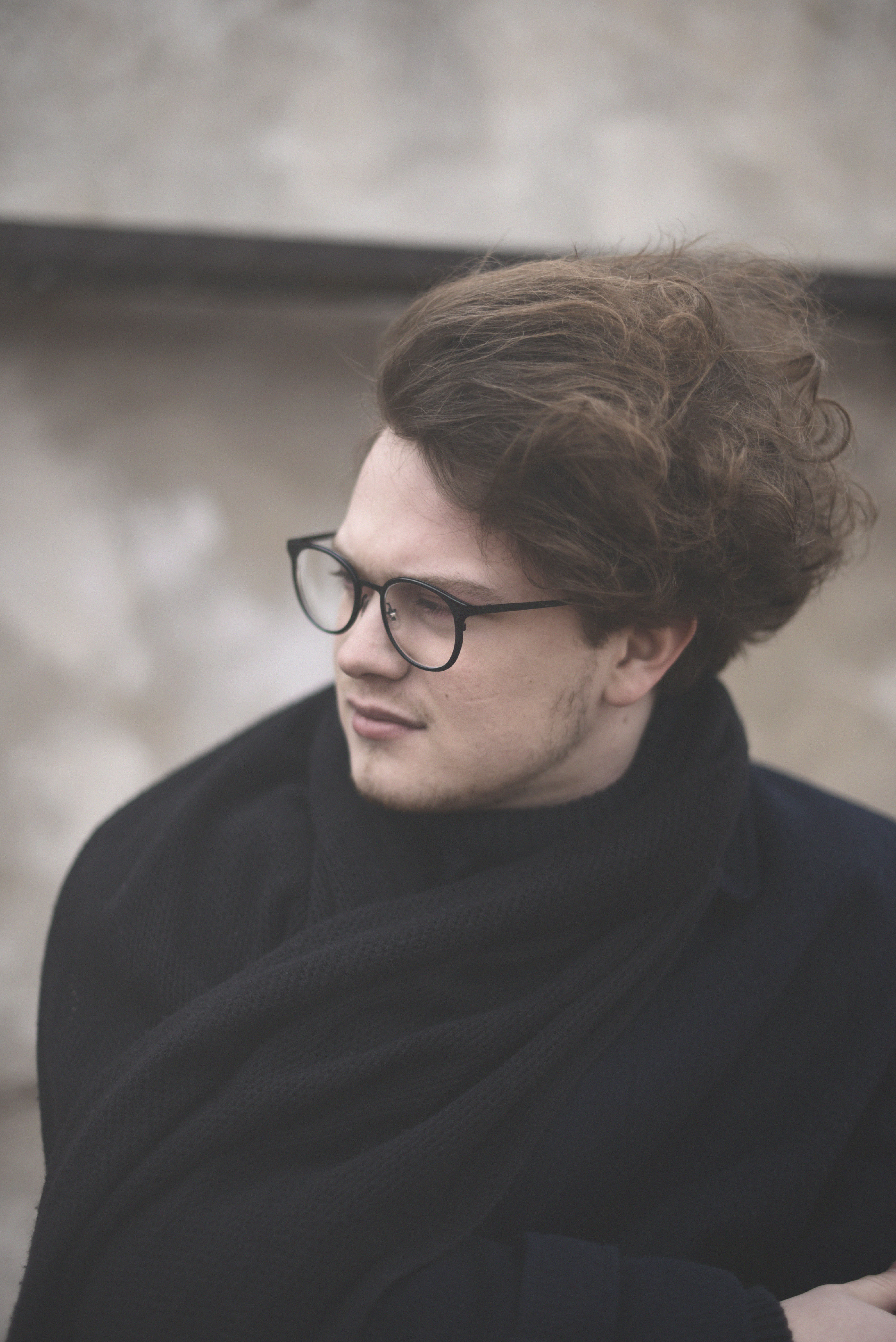 Otto Sixtus Libal Praha 2017